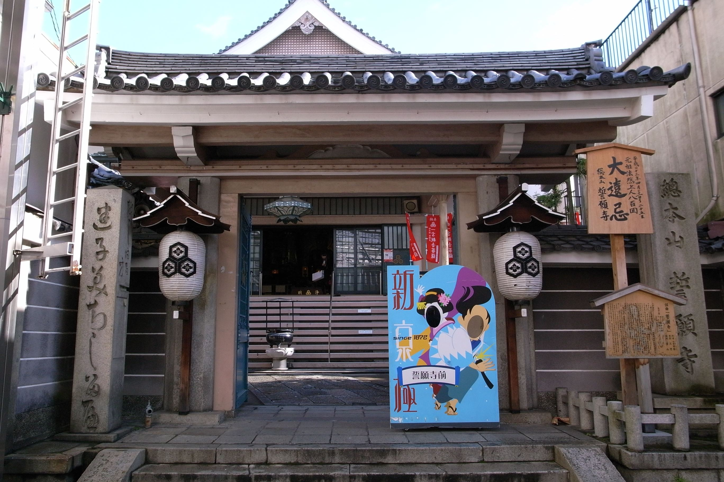 Seiganji in Shinkyogoku, Nakagyo, Kyoto, Japan.